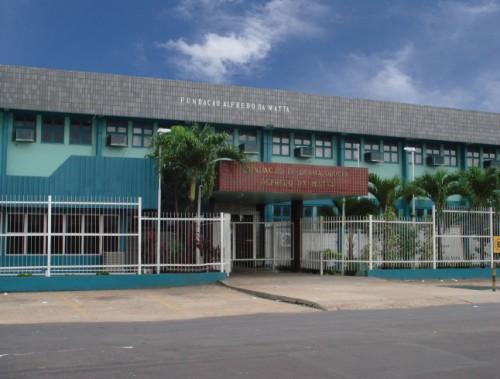 Fachada da Fundação Alfredo da Matta - Manaus - Amazonas